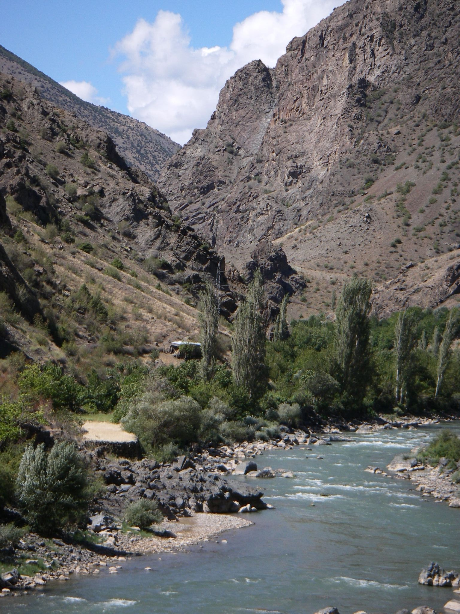 Artvin, Turkey